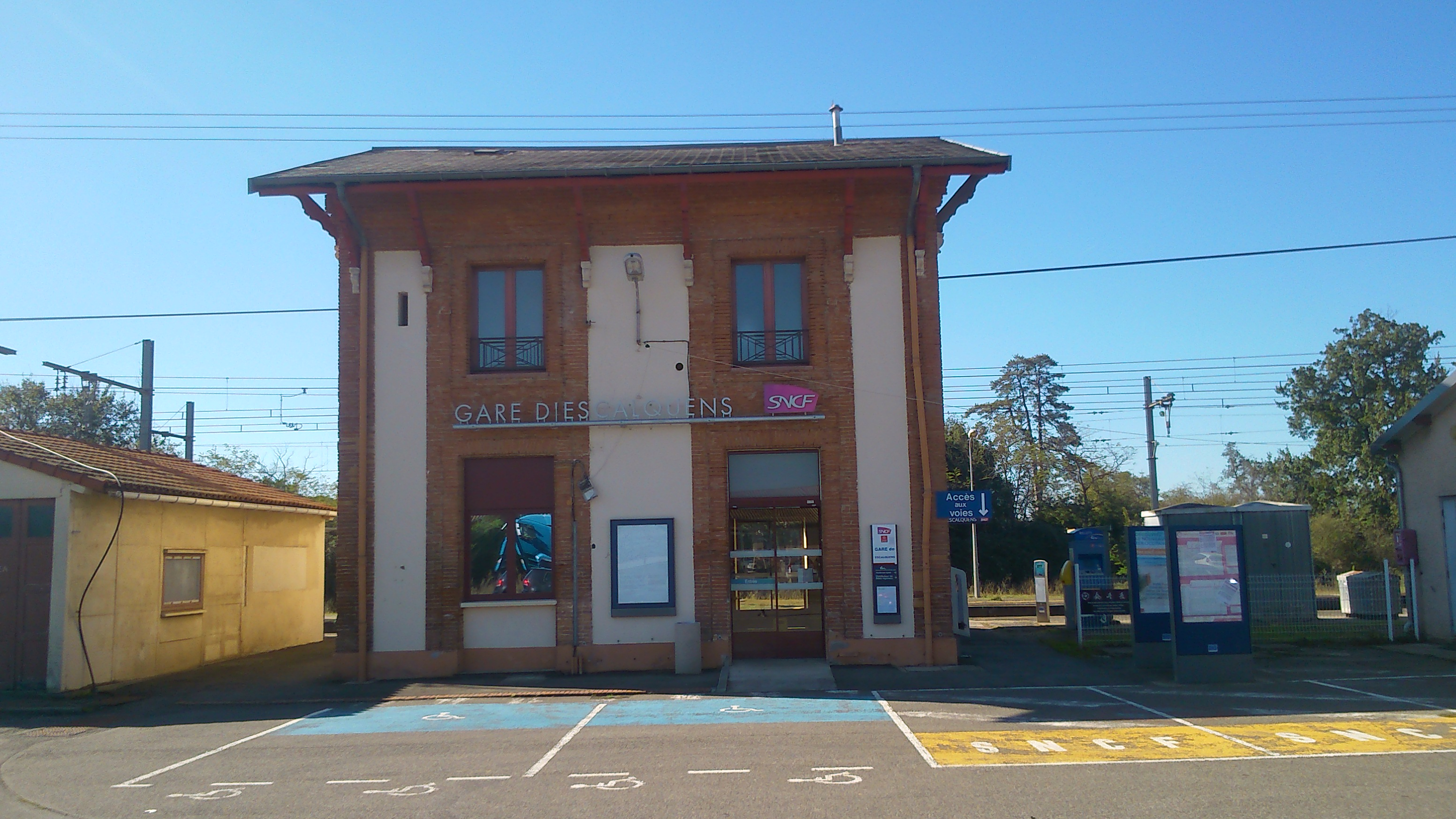 La gare d'Escalquens